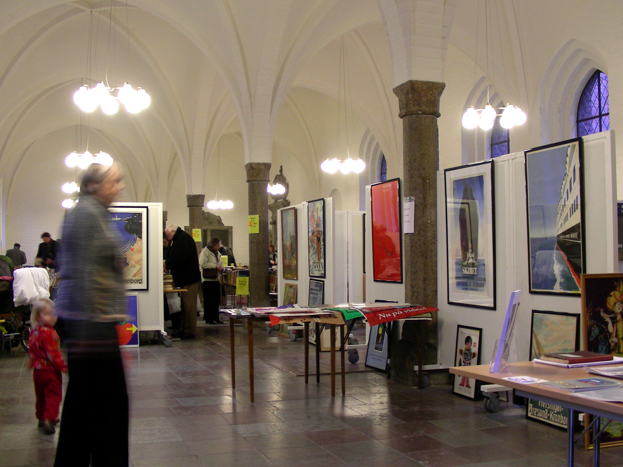 Helligåndskirken, Copenhagen, Denmark. Helligaandshuset, exhibition hall during book sale